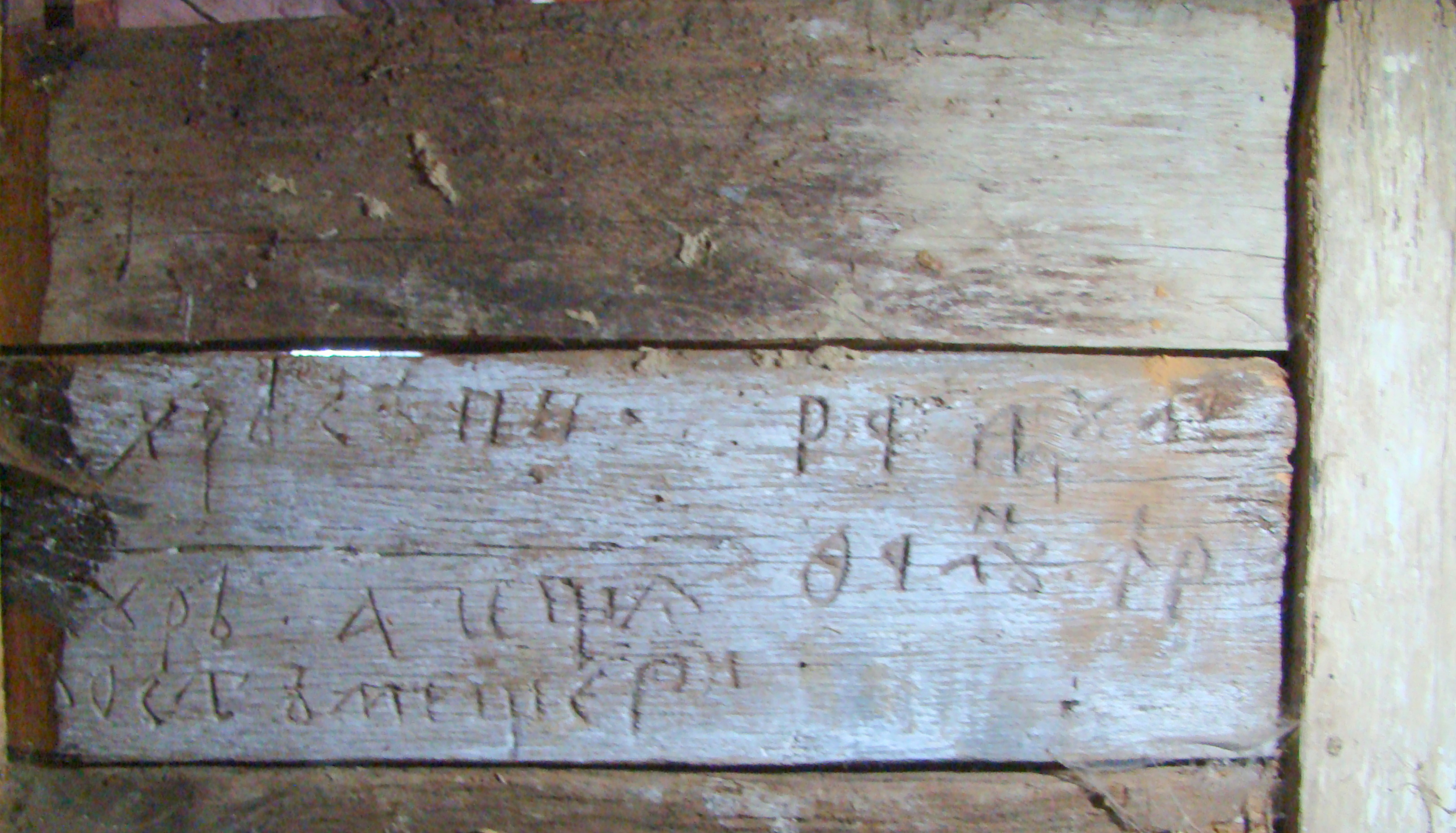 Biserica de lemn „Cuvioasa Paraschiva”, sat Grânari; comuna Jibert, str. Școlii, în cimitirul ortodox vechi sec. XVIII